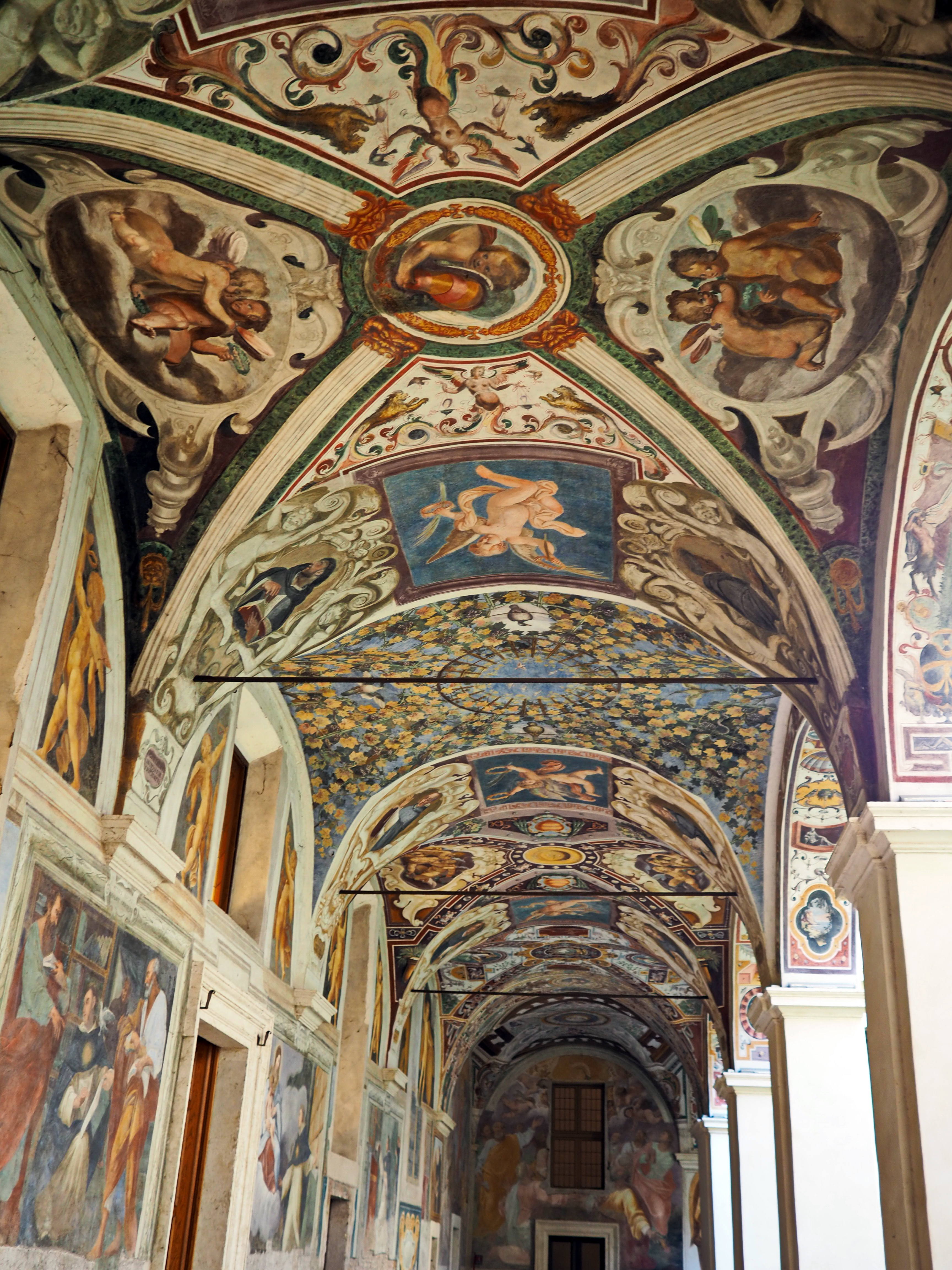 Santa Maria sopra Minerva (Rom), Kreuzgang Deckenfresken